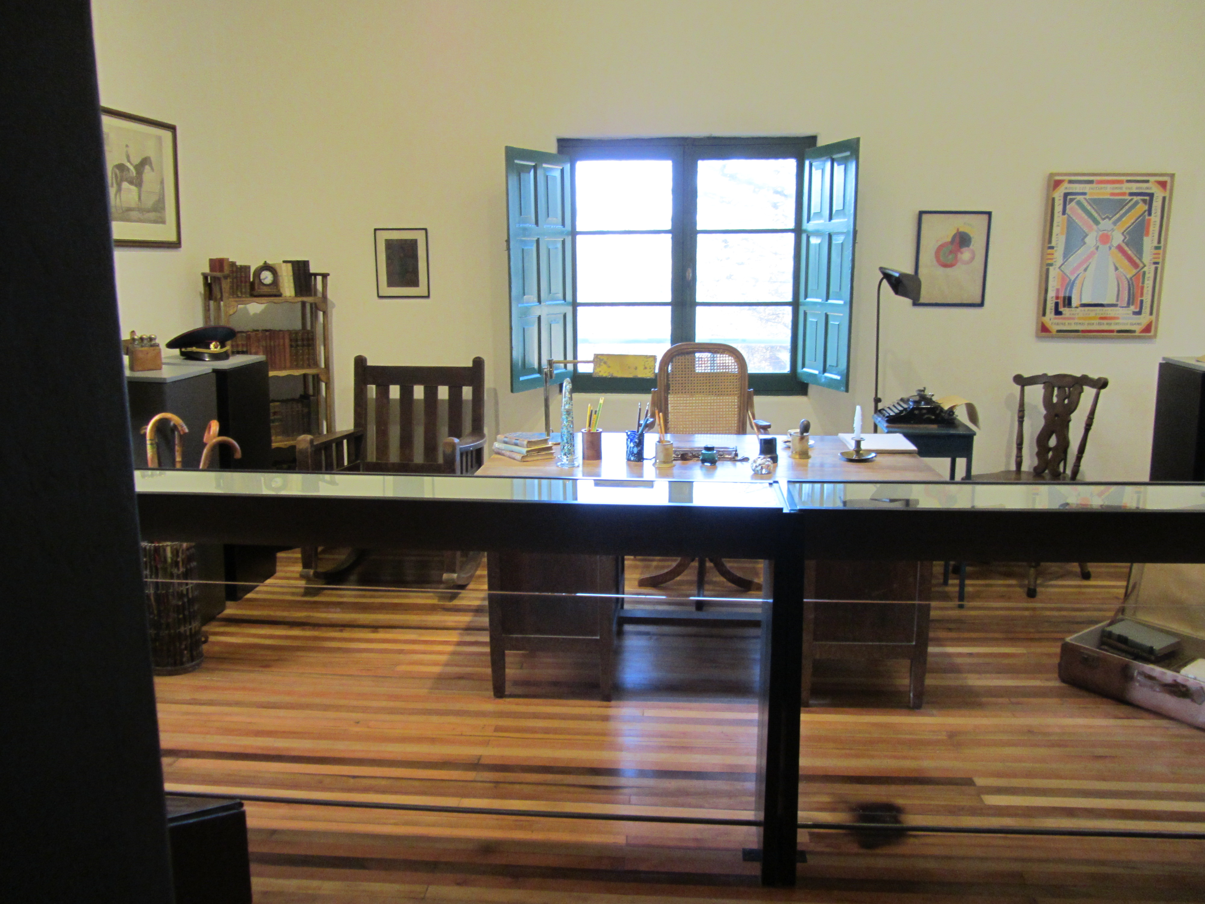 El escritorio de :Vicente Huidobro en la Casa Museo del poeta chileno; Cartagena